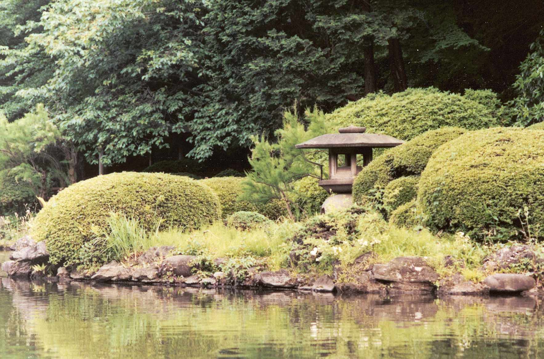 Japanese garden at Shinjuku Gyoen, Shinjuku, Tokyo, Japan